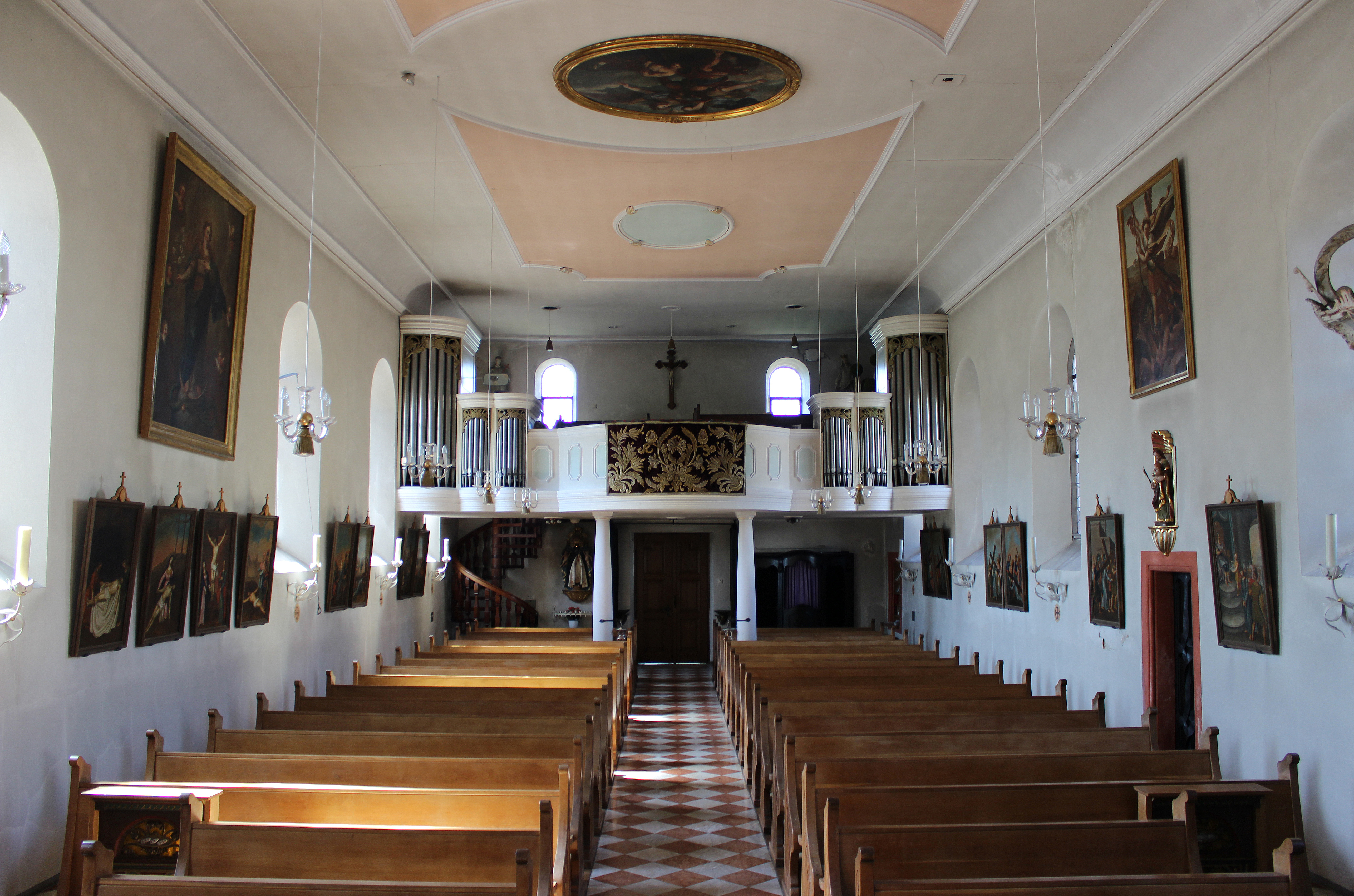 Blick ins Innere der katholischen Pfarrkirche St. Hubertus in Ihn, einem Ortsteil der Gemeinde Wallerfangen, Landkreis Saarlouis, Saarland